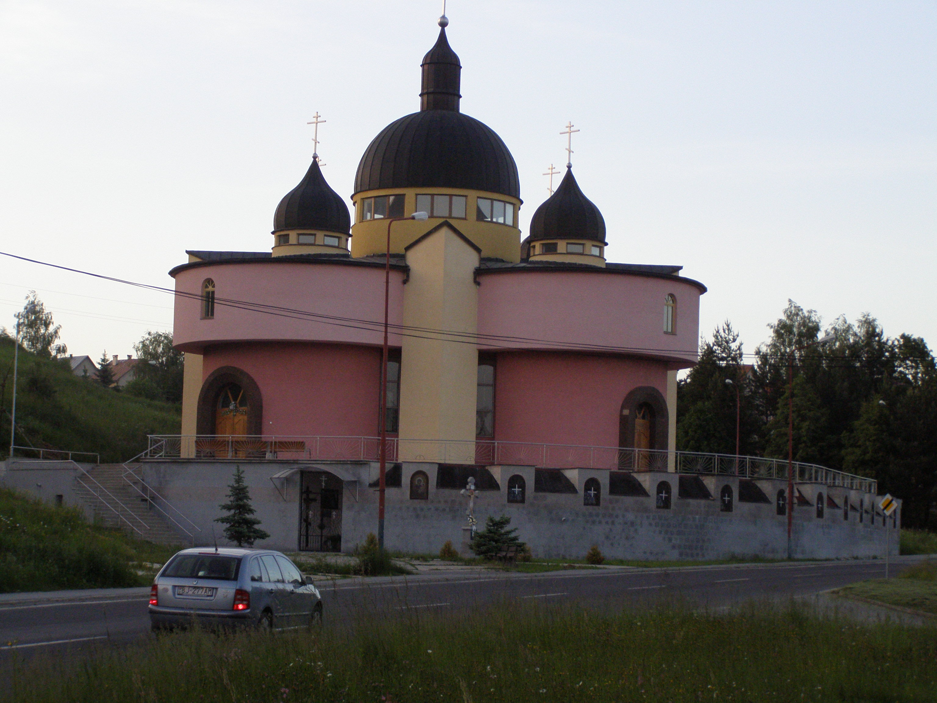 Pravoslávny chrám v Bardejove